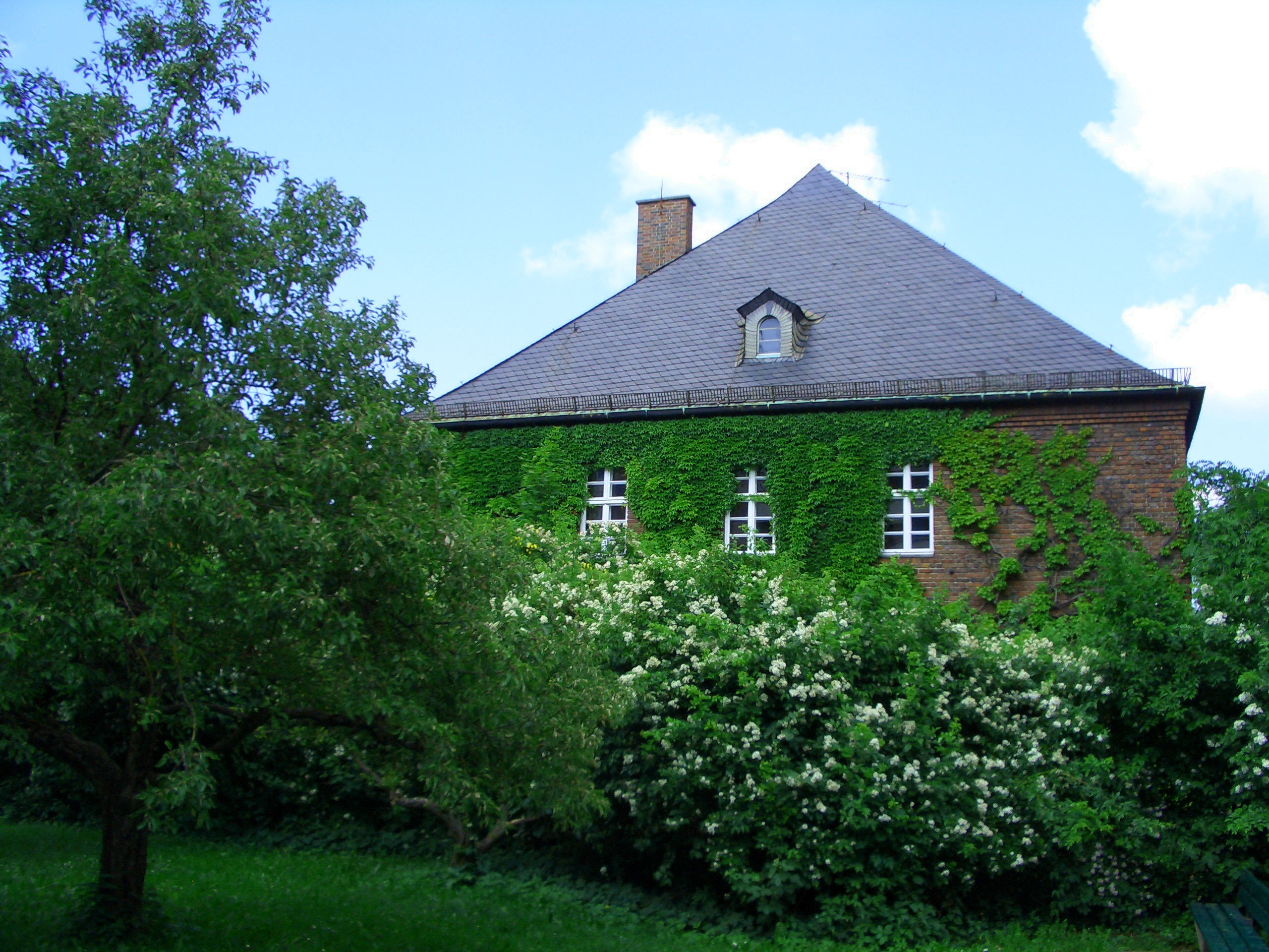 Bayerisches Kriegsarchiv in München, Gartenseite